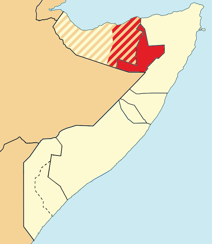 Карта Автономного государства Хатумо (Сомали)